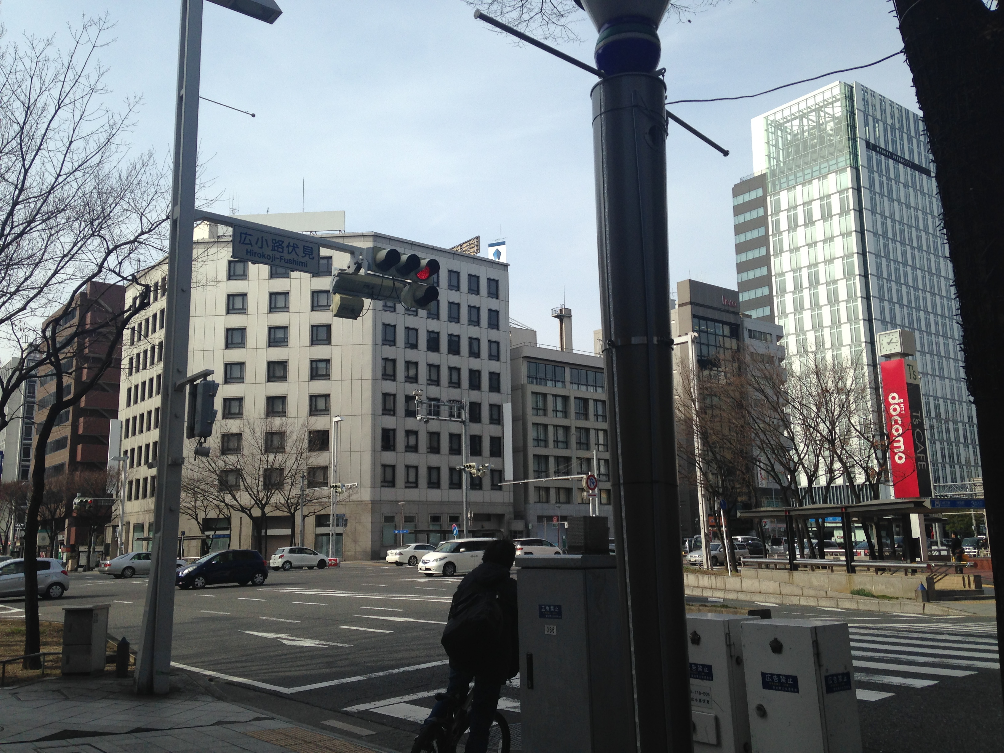 伏見駅(名古屋市営地下鉄)4番出入り口前の風景